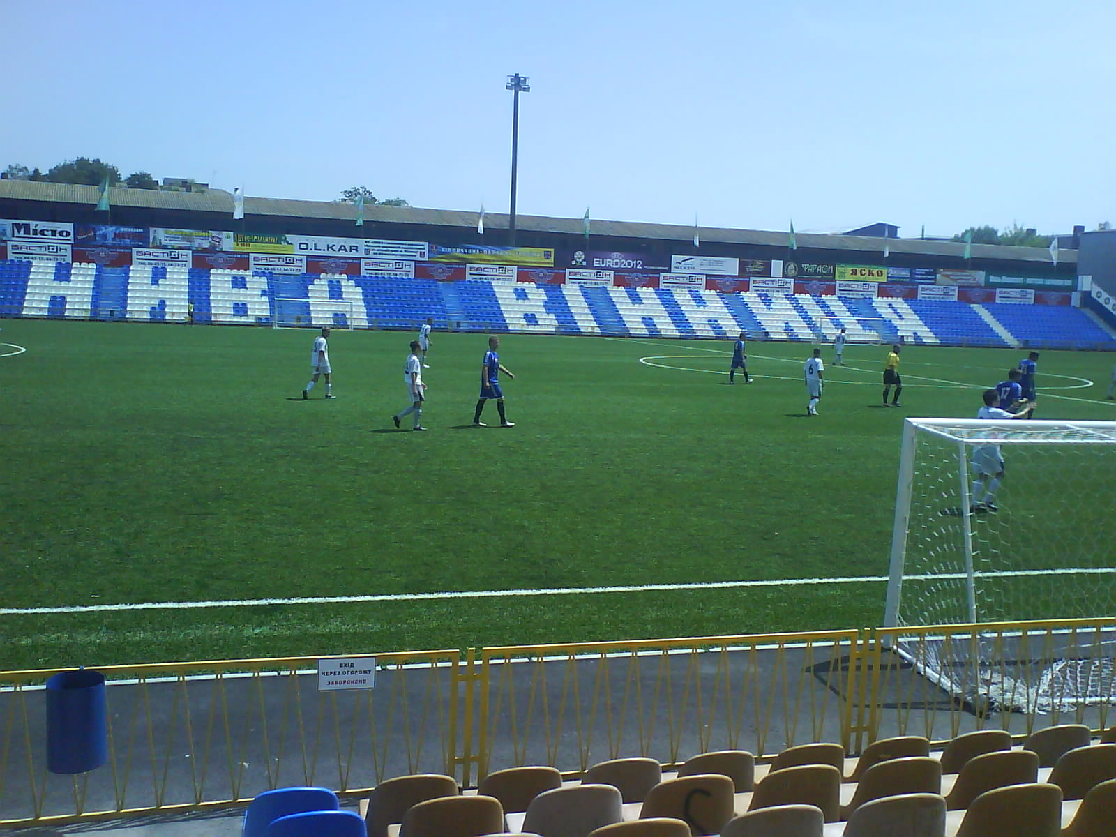 База_вінницької_Ниви.JPG: База вінницької Ниви